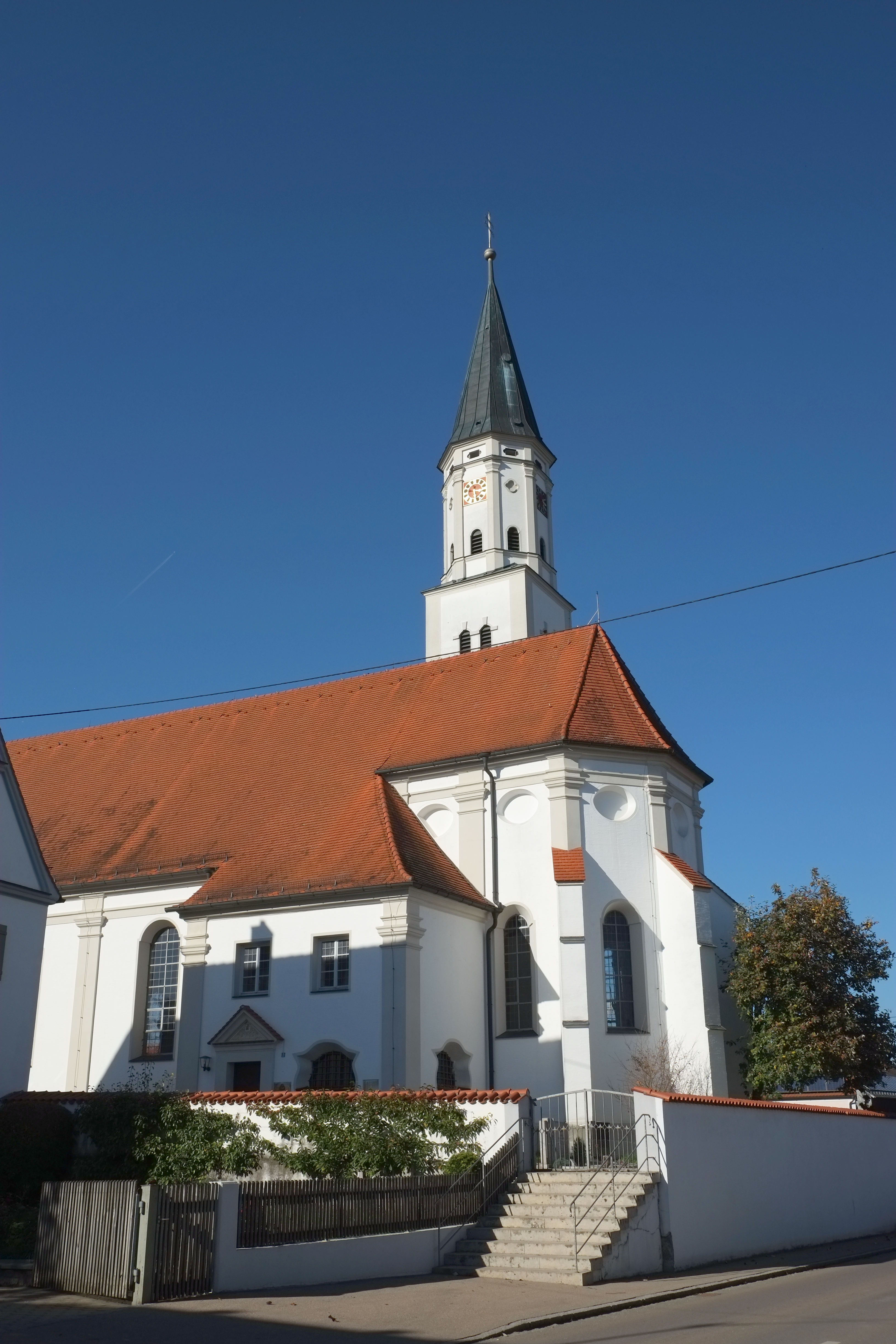 Katholische Pfarrkirche Kirche St. Martin in Blindheim im Landkreis Dillingen an der Donau (Bayern, Deutschland)